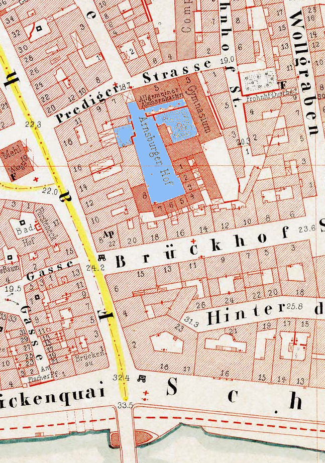 Frankfurt am Main: Der Arnsburger Hof in der östlichen Altstadt